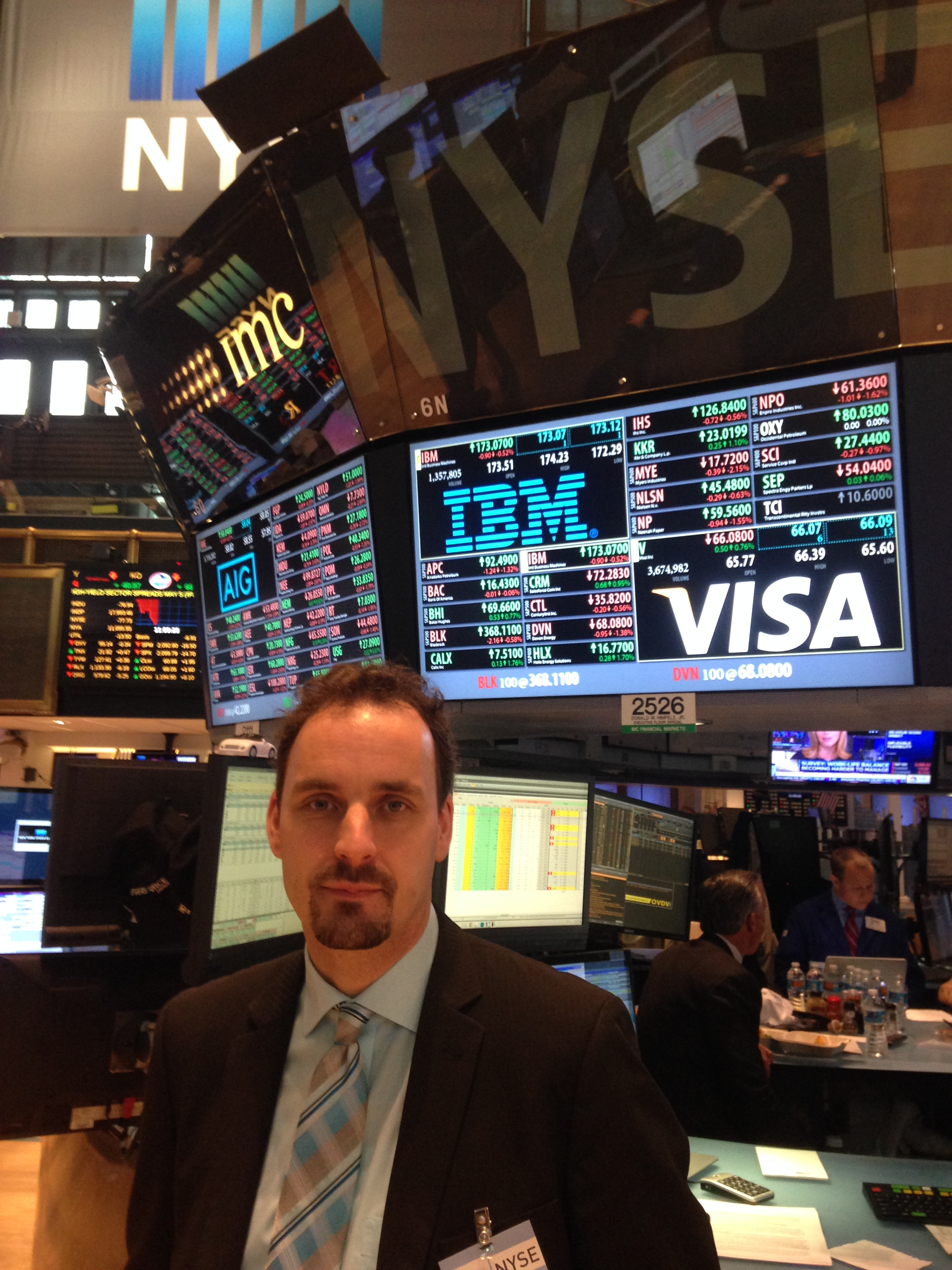 Rolf Morrien auf dem New Yorker Börsenparkett